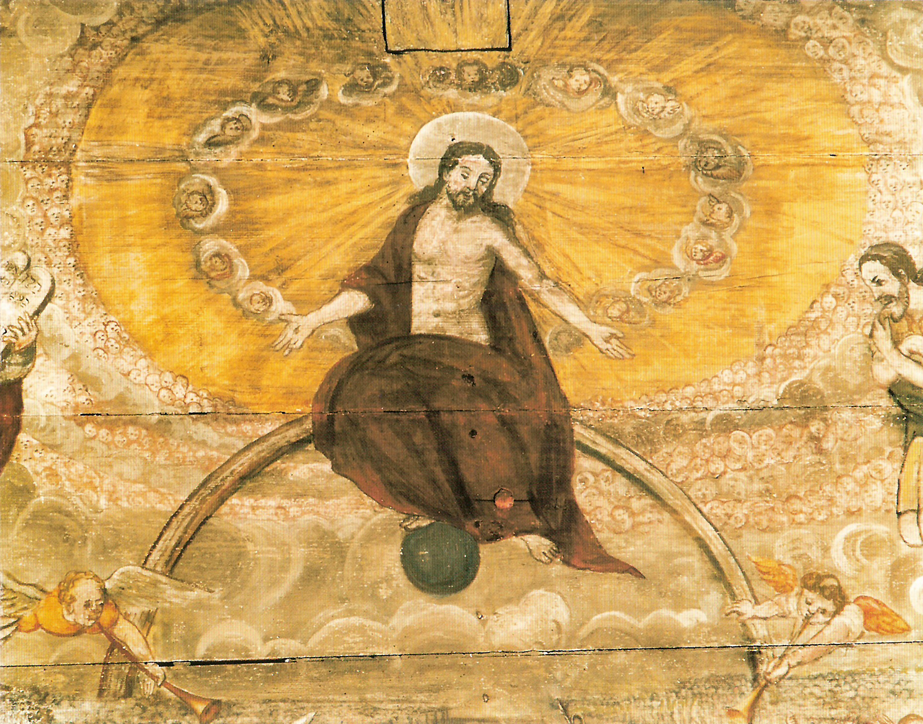 Pfarrkirche Mistelbach, Chorwand (Öl auf Holz, Ausschnitt)